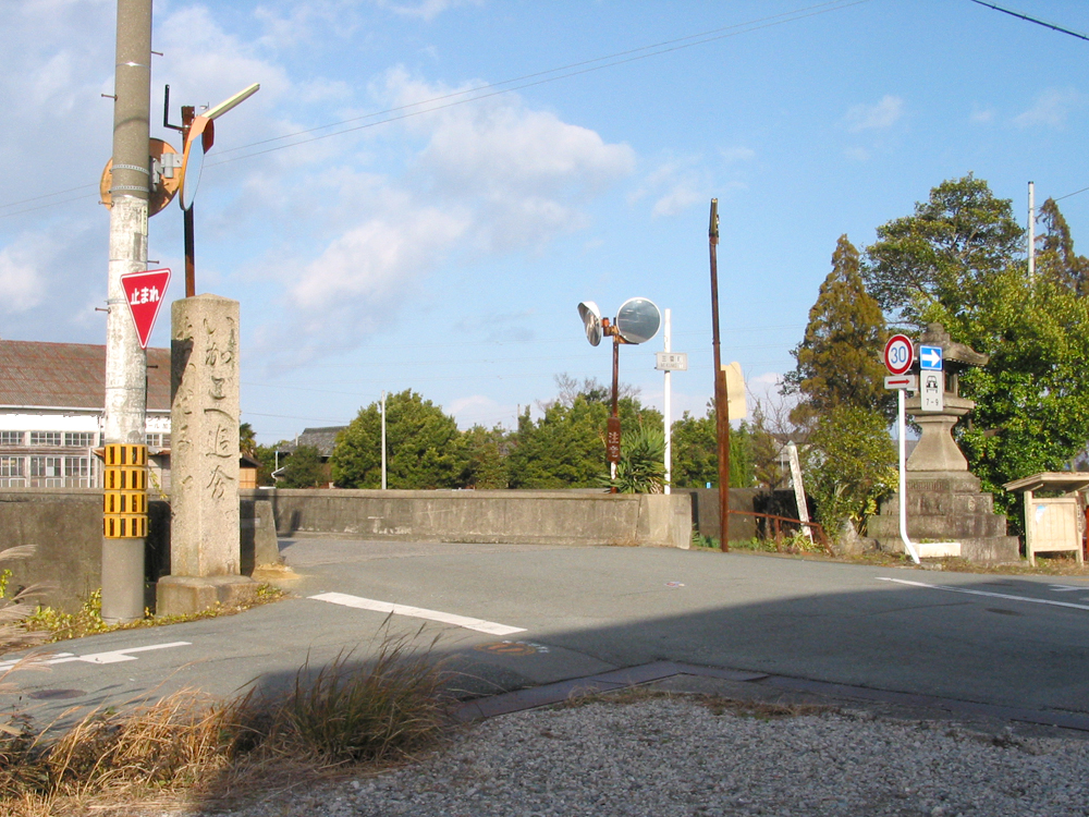 Rokken Oiwake 伊勢街道と初瀬街道の分岐する六軒追分 三重県松阪市六軒町で撮影 画像右手前：松阪・伊勢方面 左奥：三渡川を渡って津・四日市方面 左手前：伊賀・大和方面